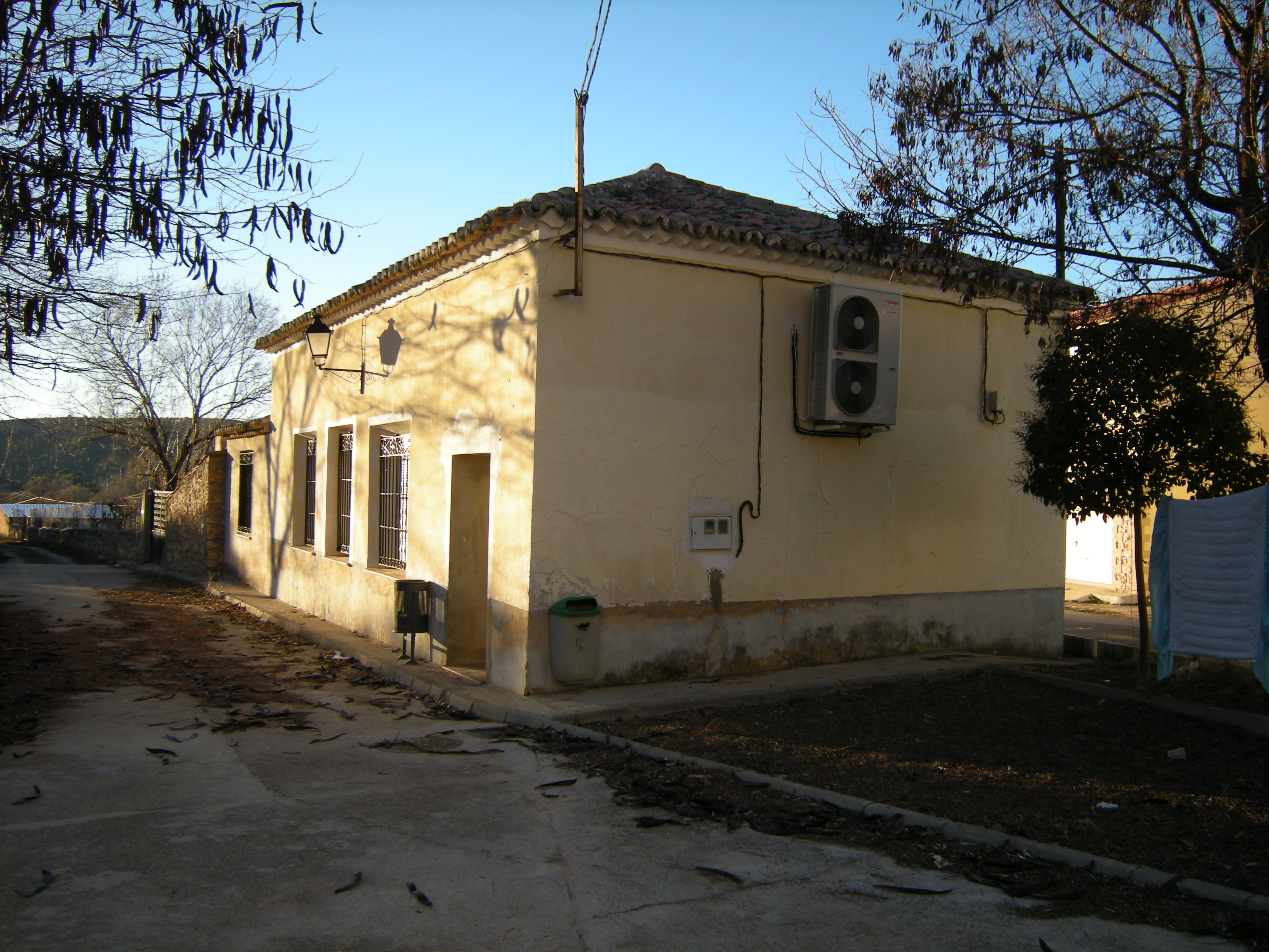 Escuela de Huetos